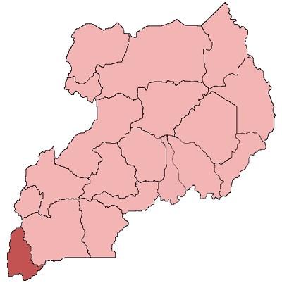 Mappa della diocesi cattolica di Kabale, in Uganda. Lavoro personale, eseguito a partire da questa immagine di Commons. Fonte per i confini delle diocesi: Guida delle missioni cattoliche 2005, a cura della Congregatio pro gentium evangelizatione, Roma, Urbaniana University Press, 2005. Categoria:Chiesa cattolica in Uganda